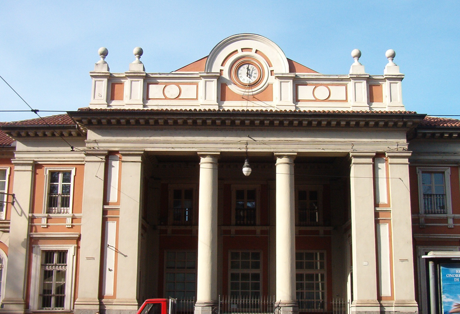 Ex-stazione ferroviaria Torino-Ceres - Turin - Italy